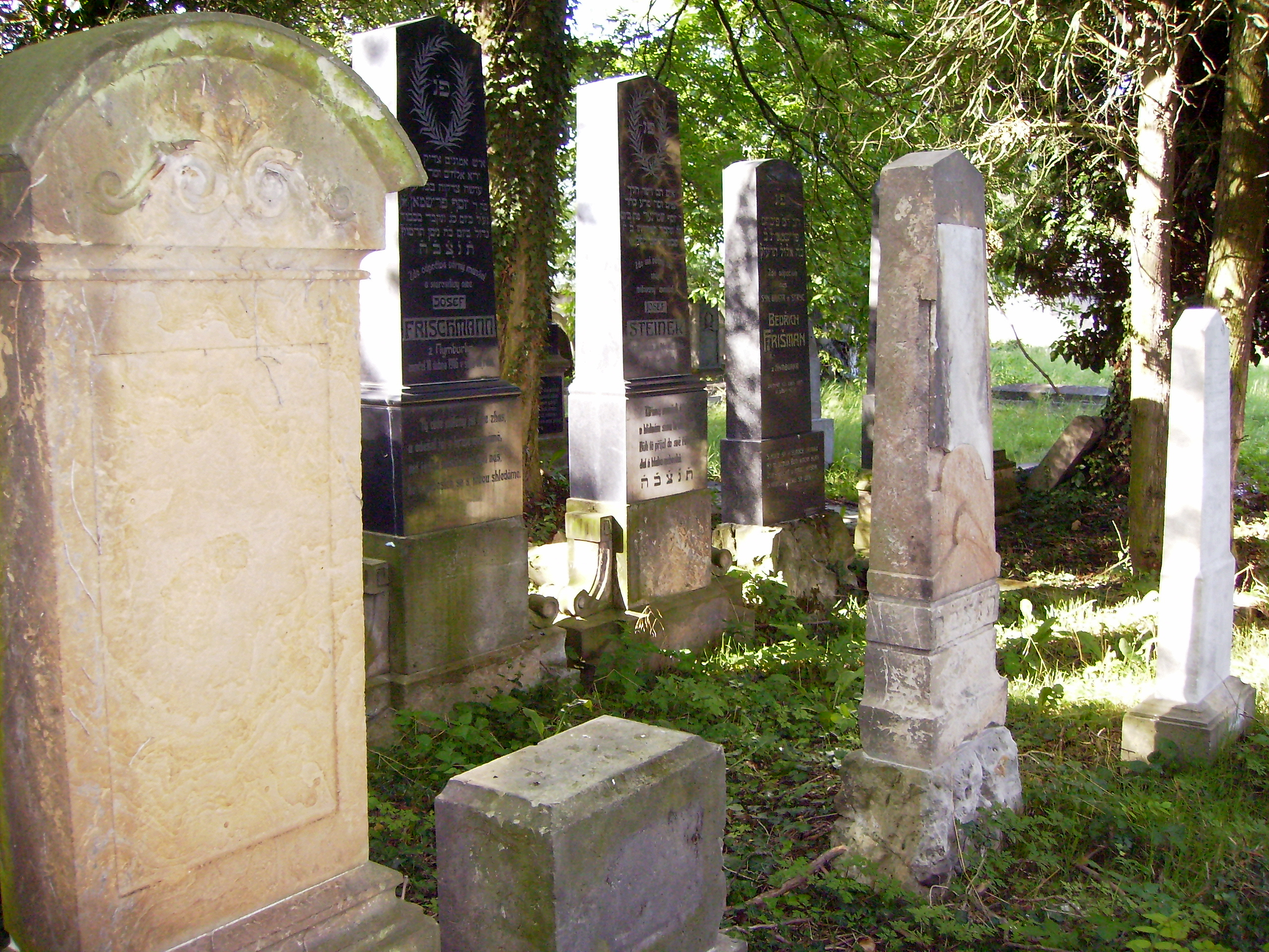 Židovský hřbitov v Kovanicích.